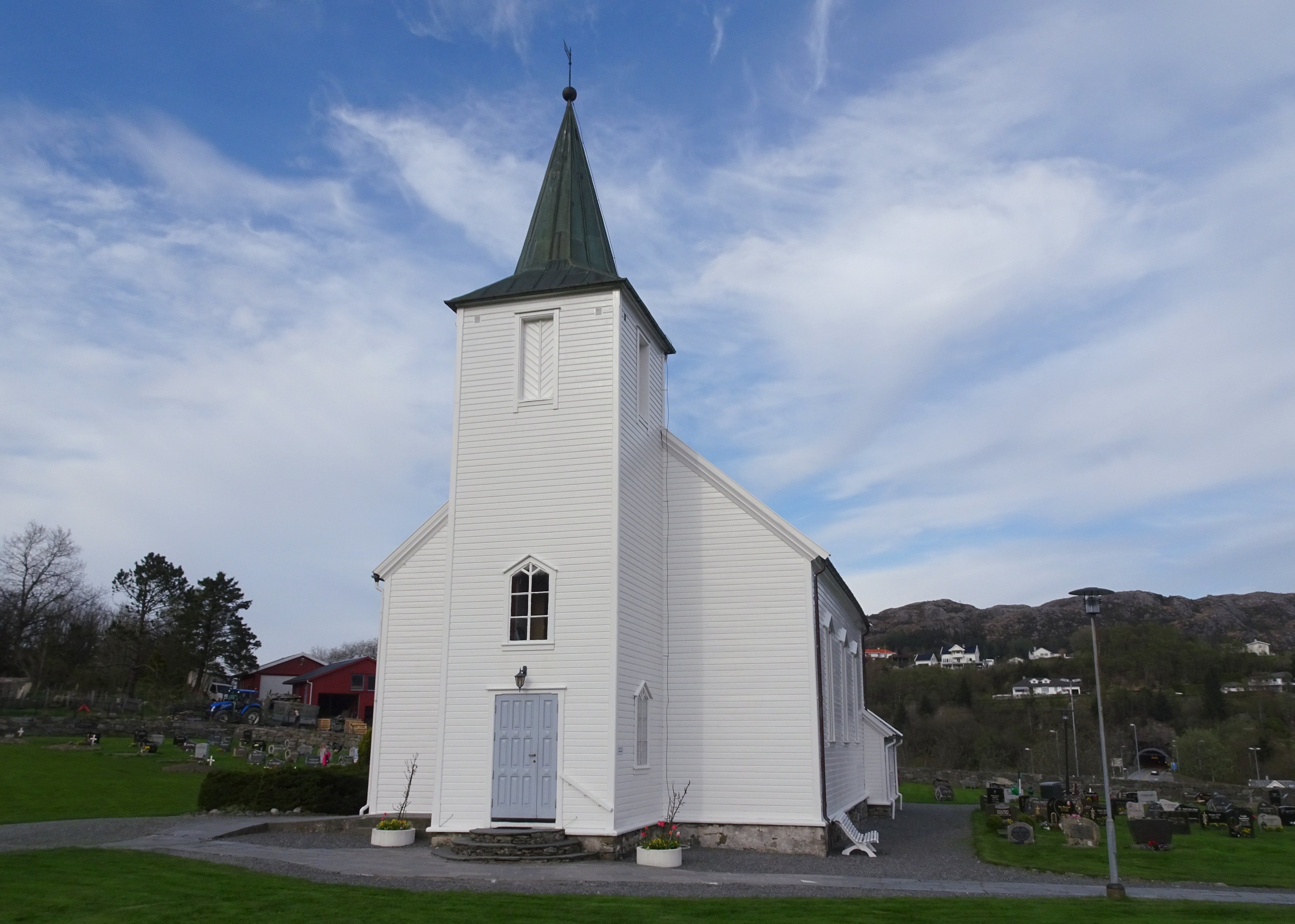 Førre kirke, Tysvær